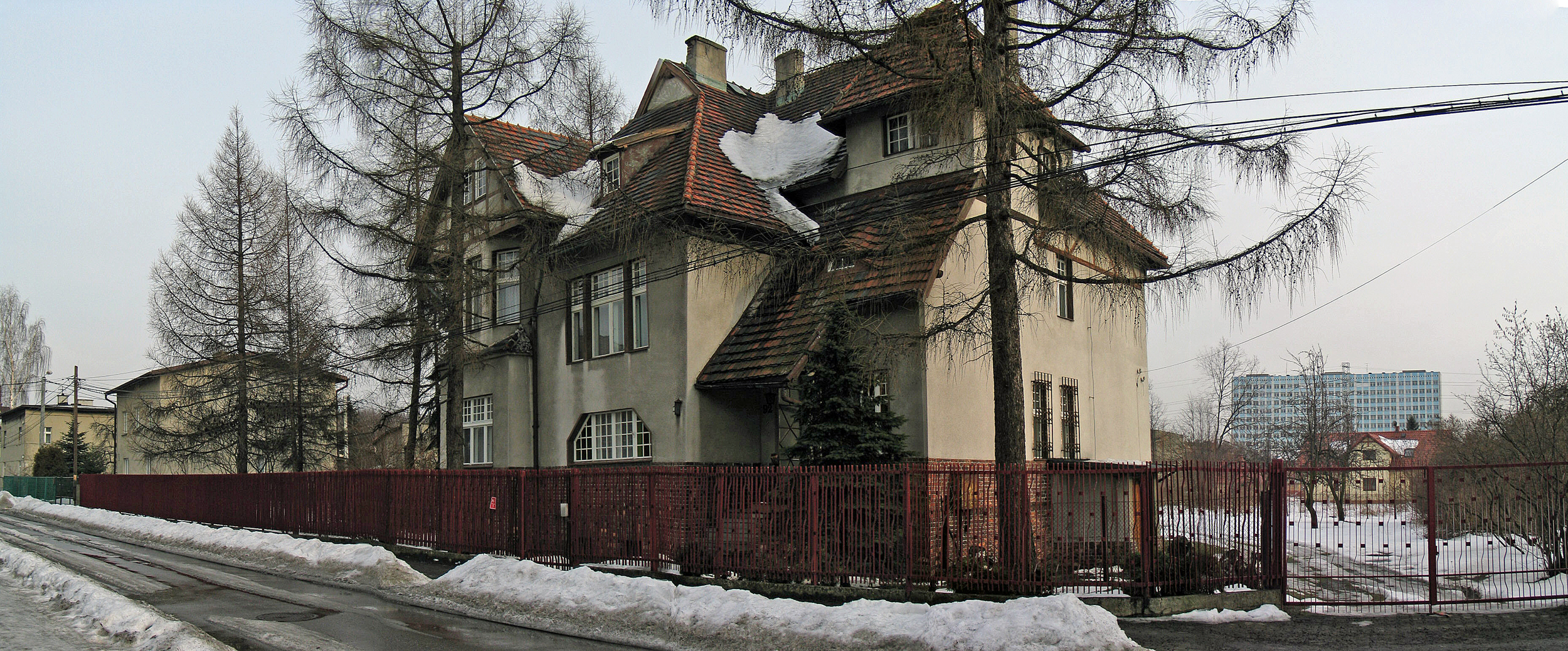 Zabytkowa willa w Katowicach-Ochojcu. W tyle szpital - symbol dzielnicy